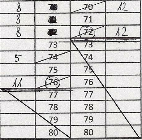 Sumowanie